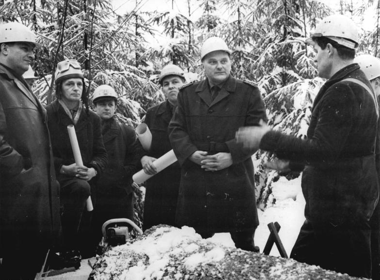 Schwarzenberg, Besuch durch Horst Heidrich Zentralbild Thieme Sche-Pr. 3.1.69 Bez. Karl-Marx-Stadt: Plananlauf in Forstwirtschaftskooperation. Der Generalforstmeister der DDR, Horst Heidrich (2.v.r.) besuchte zum Plananlauf 1969 die Forstarbeiter des Kooperationsverbandes "Rohholz-Schnittholz Erzgebirge" in Schwarzenberg.